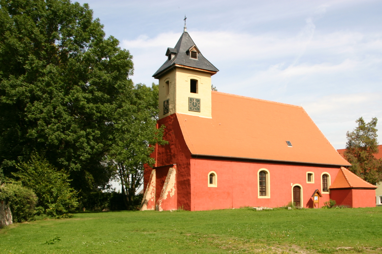 Zehringen ist ein Stadtteil von Köthen (Anhalt), Sachsen-Anhalt.